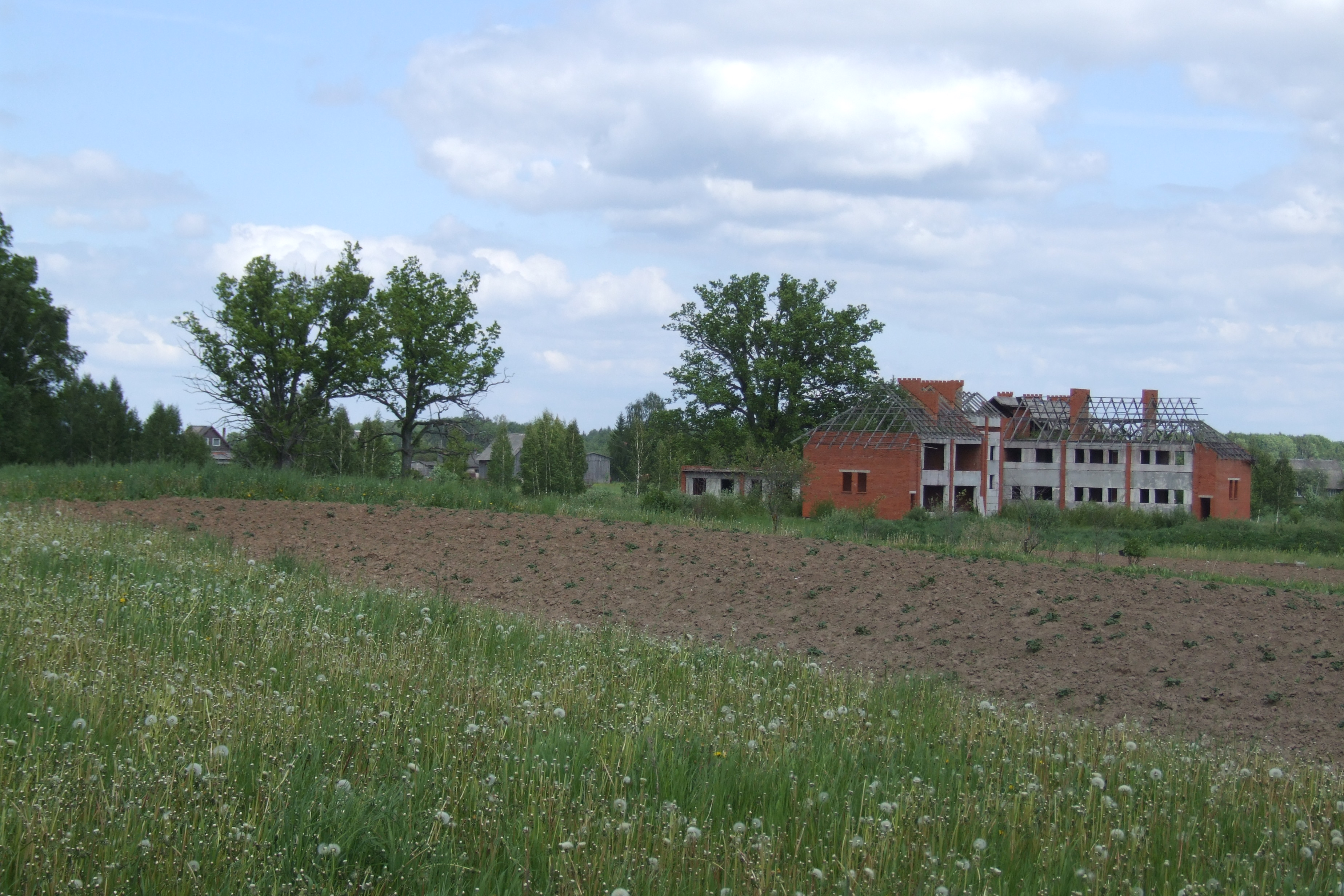 Nepabeigta padomju laiku jaunbūve, 28.05.2011.